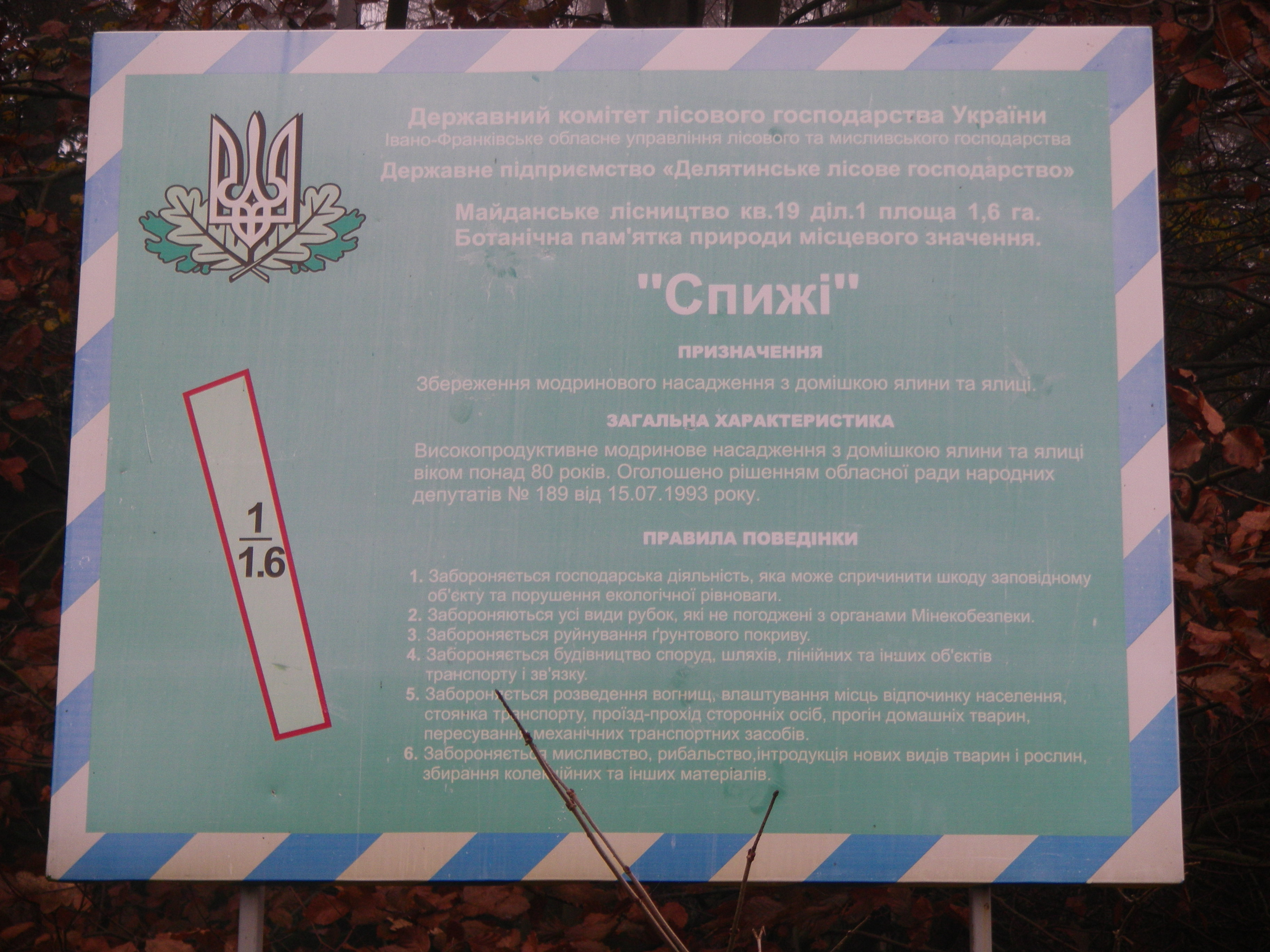 Інформаційний щит про ботанічну пам'ятку природи «Спижі», що знаходиться у с. Середній Майдан, Надвірнянський район, ID 26-240-5147